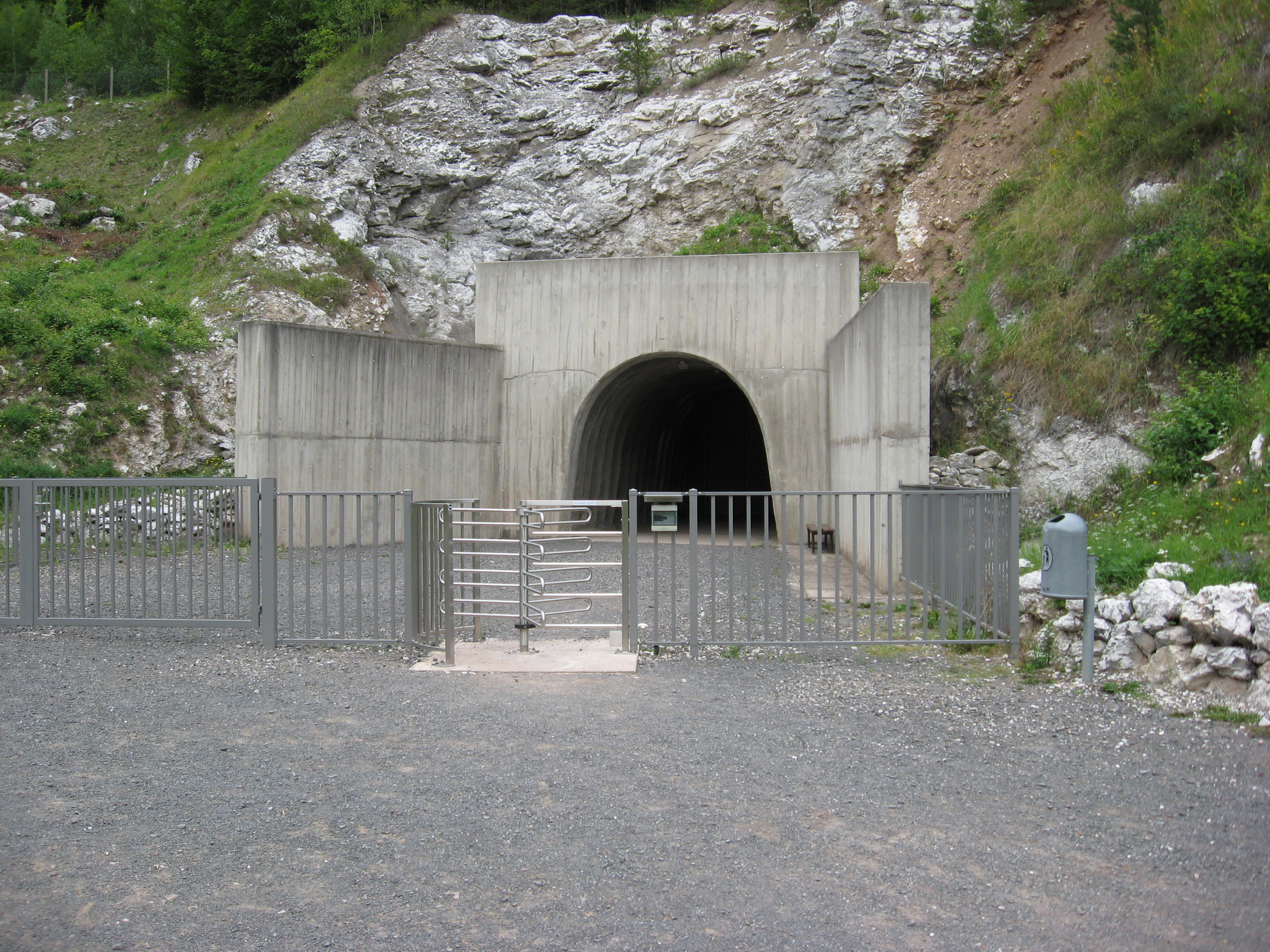 Der 1995 angelegte Zugang zum Stollensystem des KZ Mittelbau-Dora. Der ursprüngliche Stolleneingang B (1947 gesprengt) lag links daneben